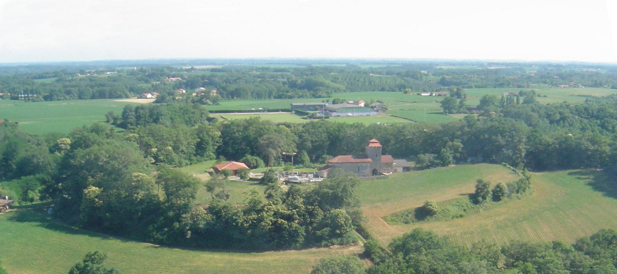 Camp de Murs ; Doasit ; Gasconha